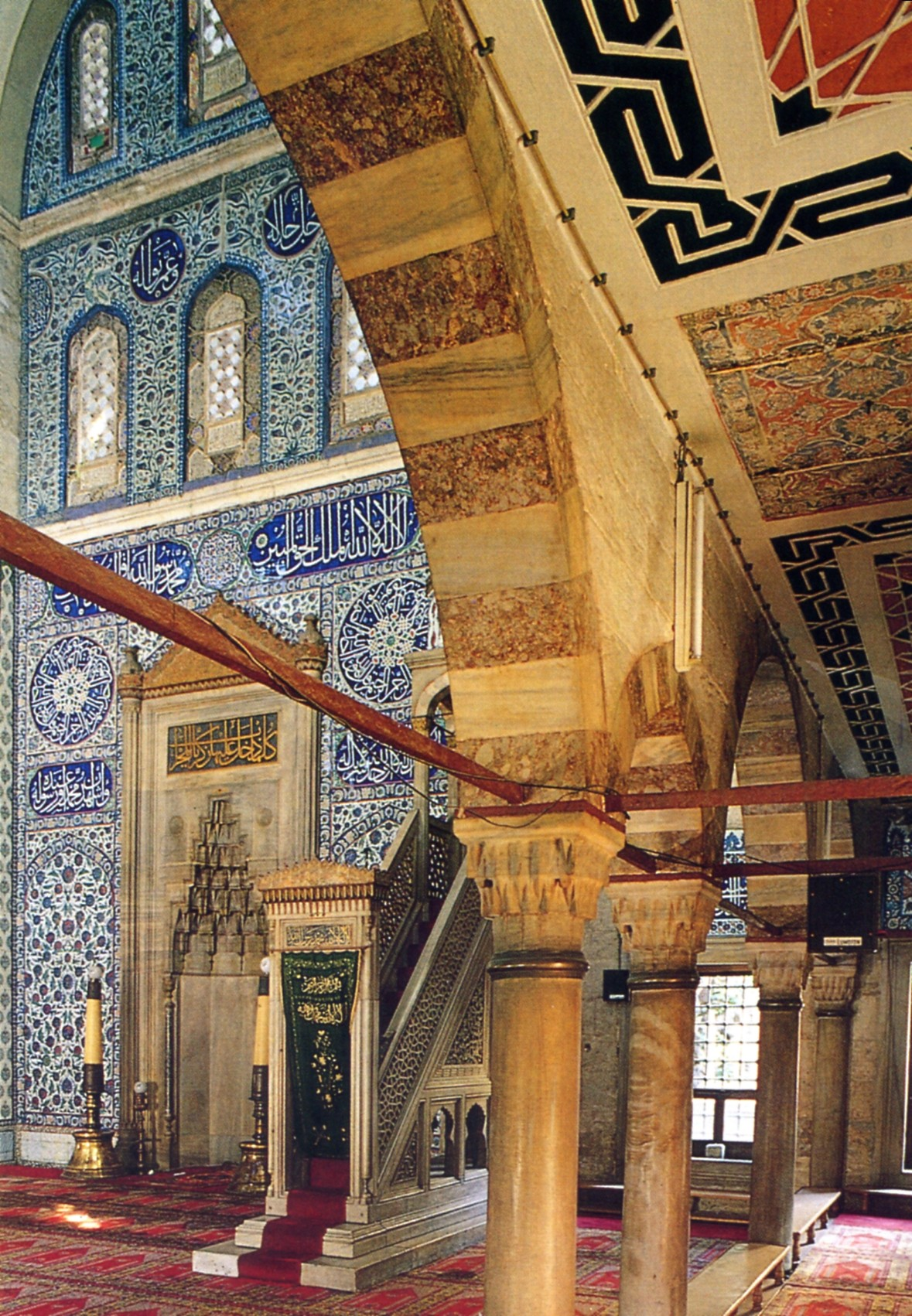 Sokollu Mehmet Pasha Camii interior view